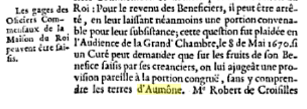 Scanner d'une partie d'un ouvrage de droit de 1709.